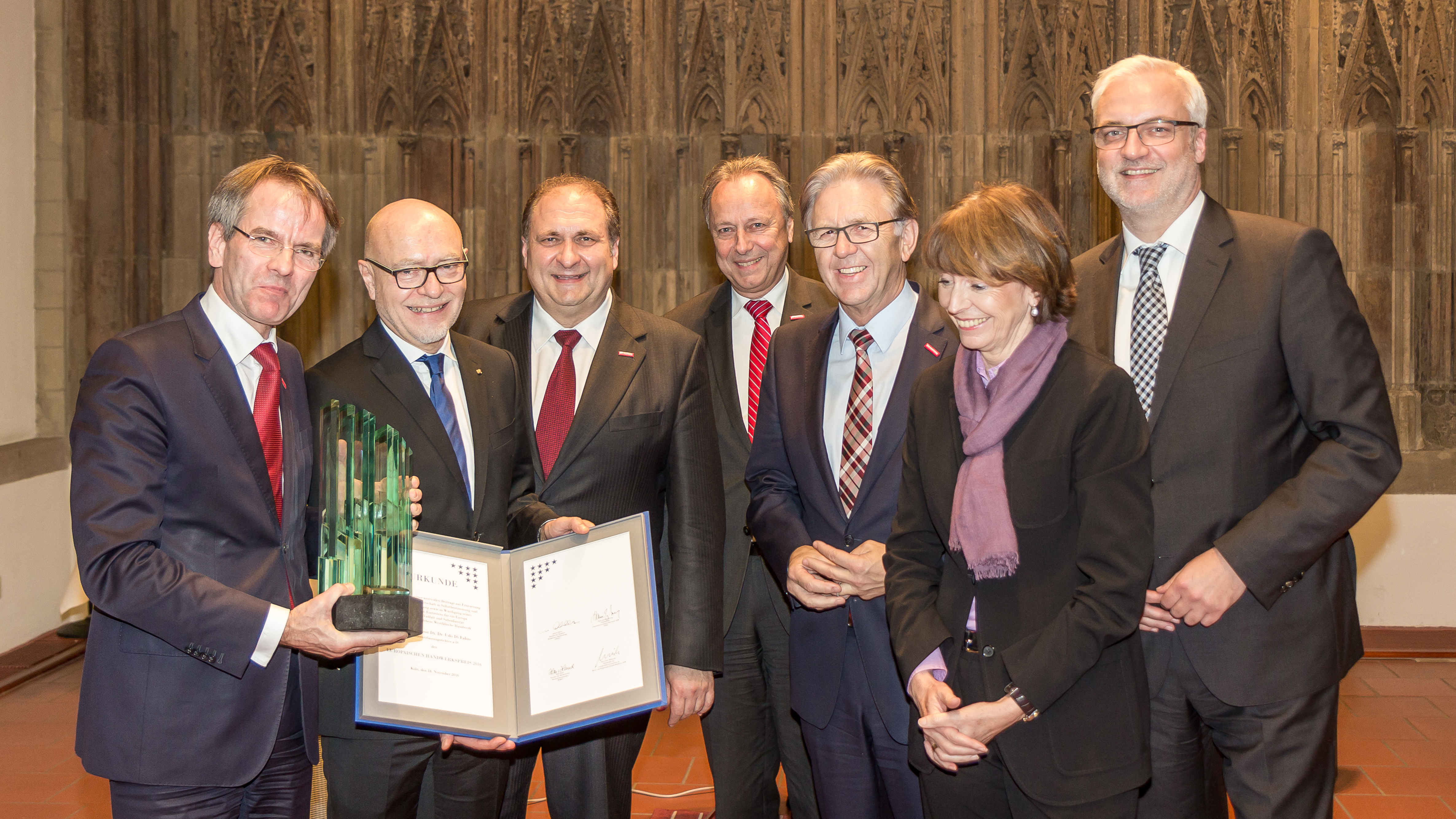 Verleihung des Europäischen Handwerkspreises an Udo Di Fabio Foto: Andreas Ehlert (Präsident des Nordrhein-Westfälischen Handwerkstags), Udo Di Fabio, Hans Peter Wollseifer (Präsident des Zentralverbands des Deutschen Handwerks und der Handwerkskammer zu Köln), ?, ?, Oberbürgermeisterin Henriette Reker, Garrelt Duin (Minister für Wirtschaft, Energie, Industrie, Mittelstand und Handwerk des Landes Nordrhein-Westfalen)